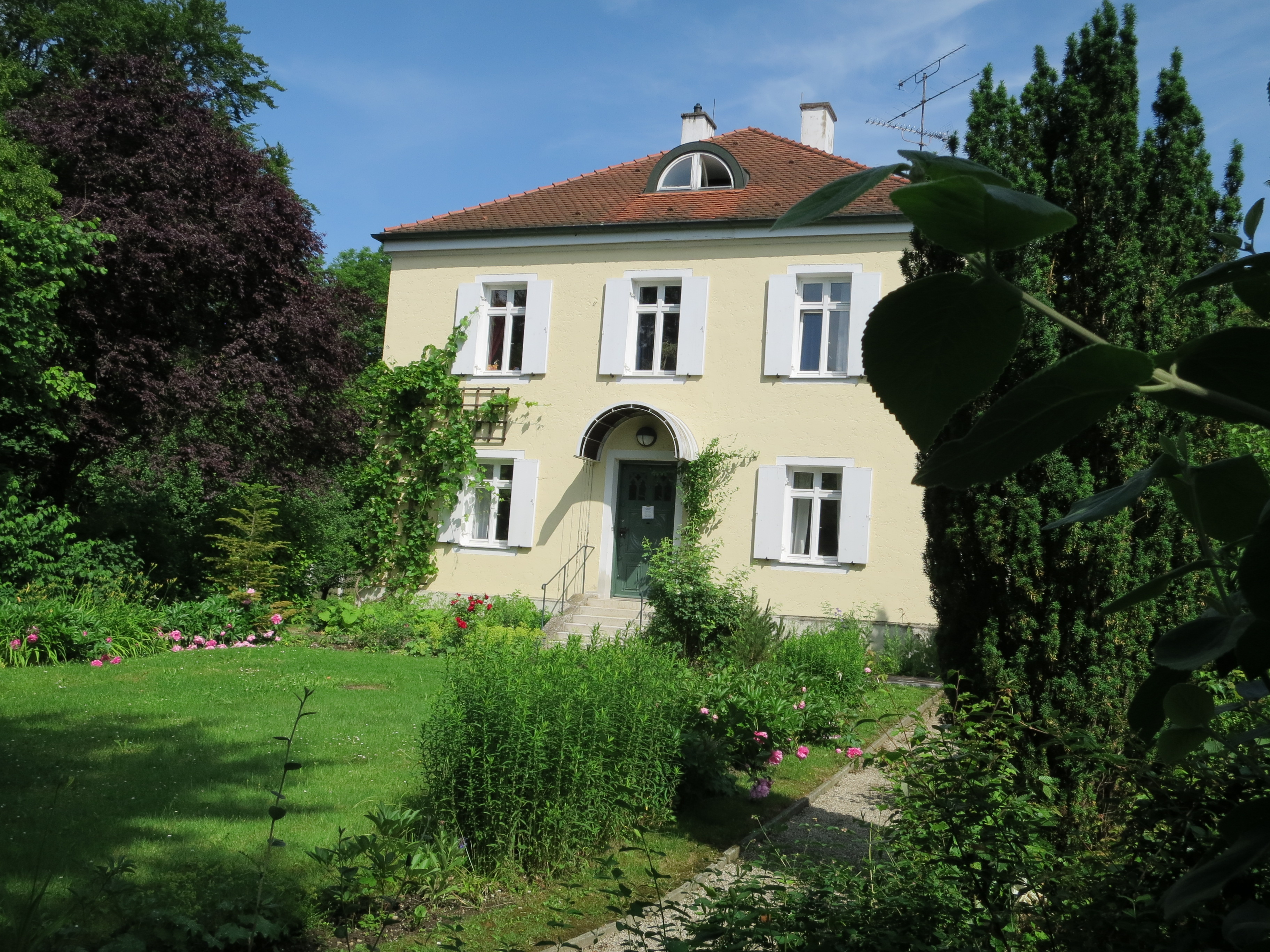 Hohenbacherner Straße 37, Pfarrhaus zweigeschossiger kubischer Putzbau mit flachem Walmdach, erbaut 1854-55 Es ist ein geschütztes Baudenkmal mit der Nummer D-1-78-124-100